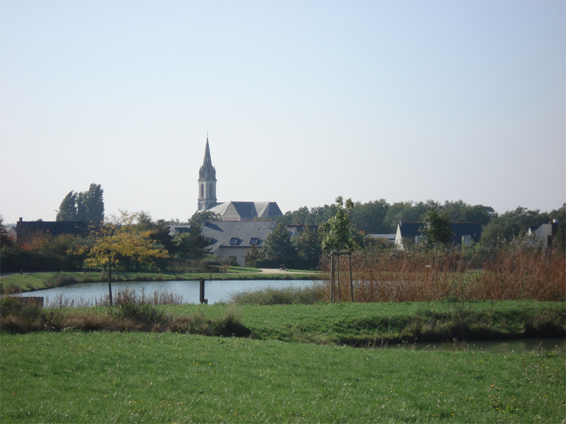 Vue de Saint-Sylvain-d'Anjou (Maine-et-Loire, France) depuis le théâtre de verdure du parc André Delibes.